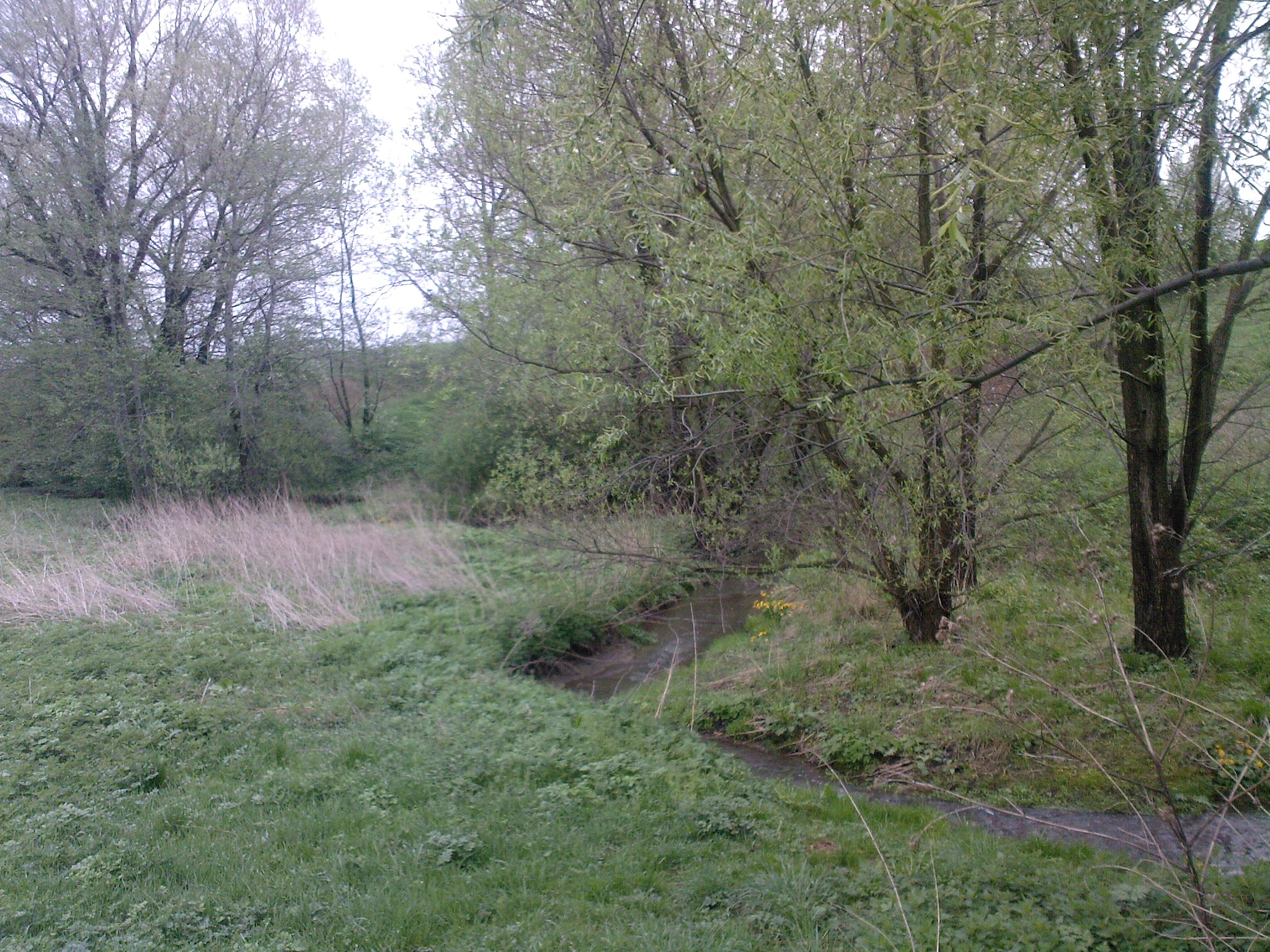 Potok Surządek w Radziechowach meandrujący poniżej mostku będącego częścią ulicy Promiennej